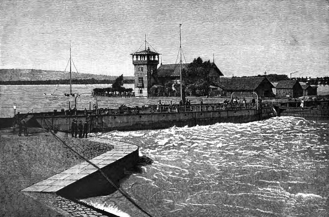 Wien-Nußdorf, Donau-Hochwasser 1890, Schwimmtor (Sperrschiff)